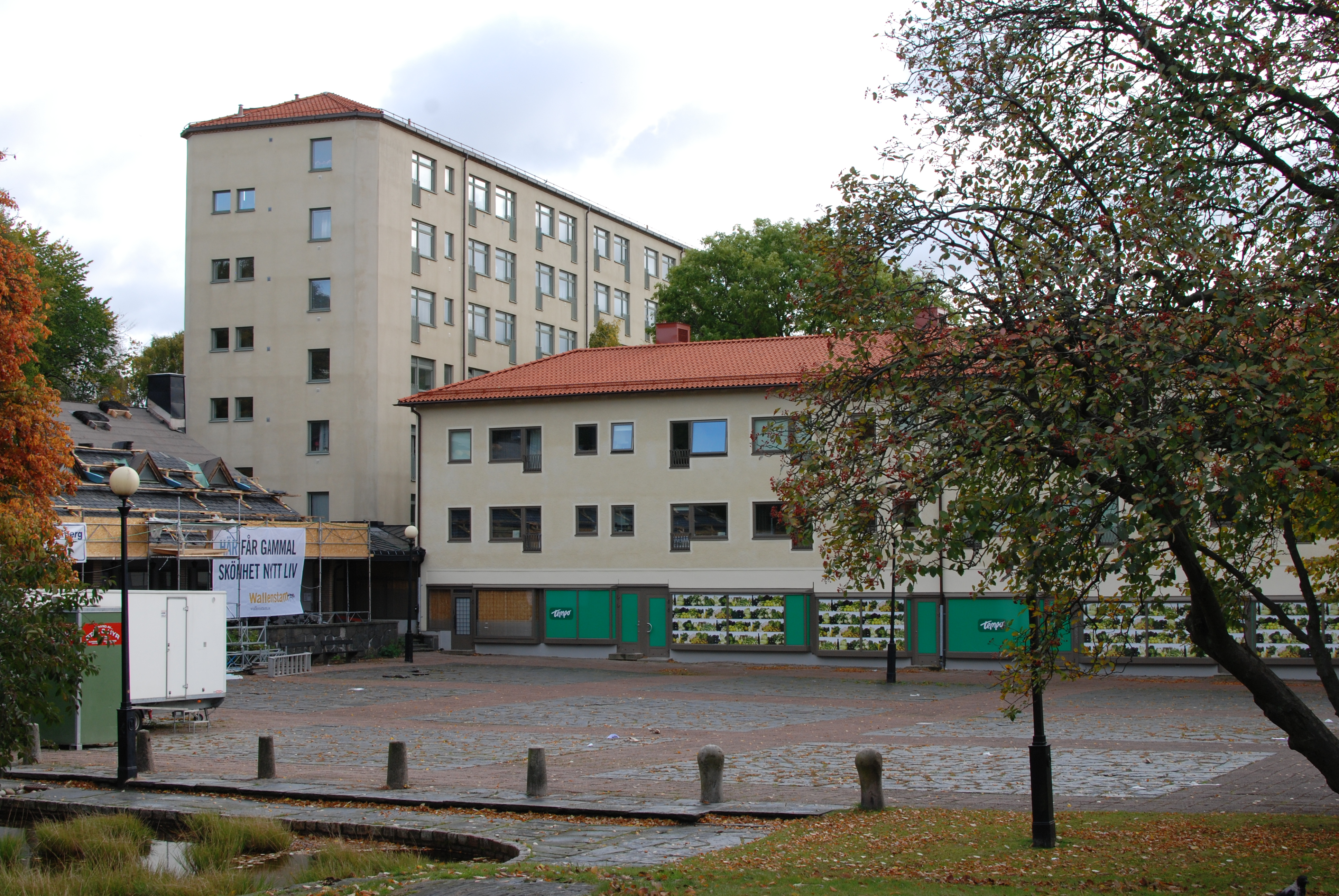 Guldhedstorget på Norra Guldheden i Göteborg.